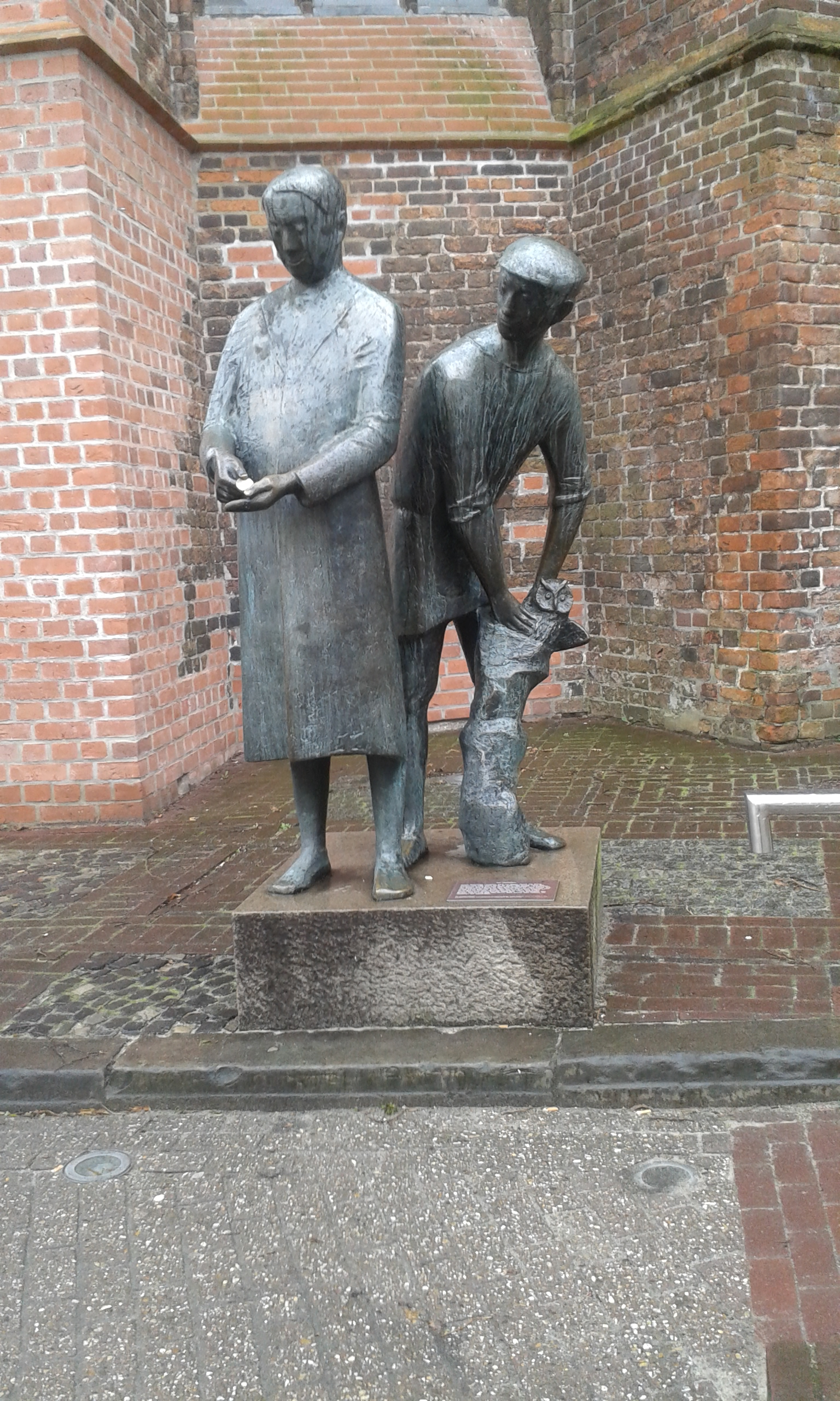 monument